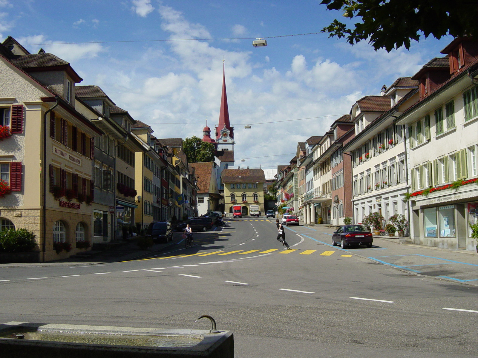 Flecken of Beromünster, Switzerland